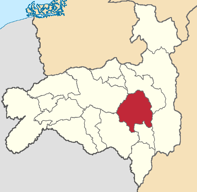 Mapa localizador del cantón en Loja, Ecuador